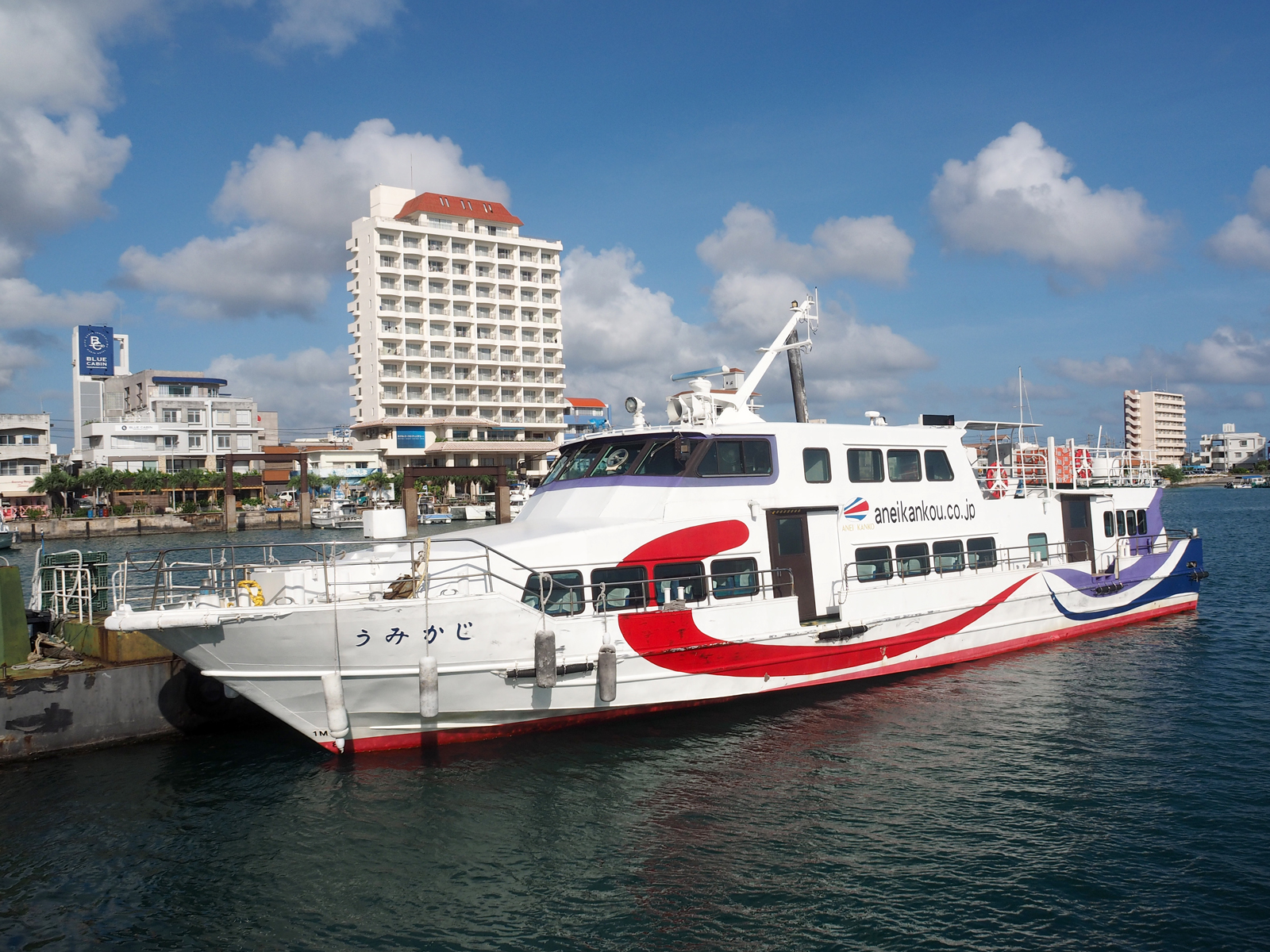 安栄観光のうみかじ（沖縄県石垣市の石垣港にて）